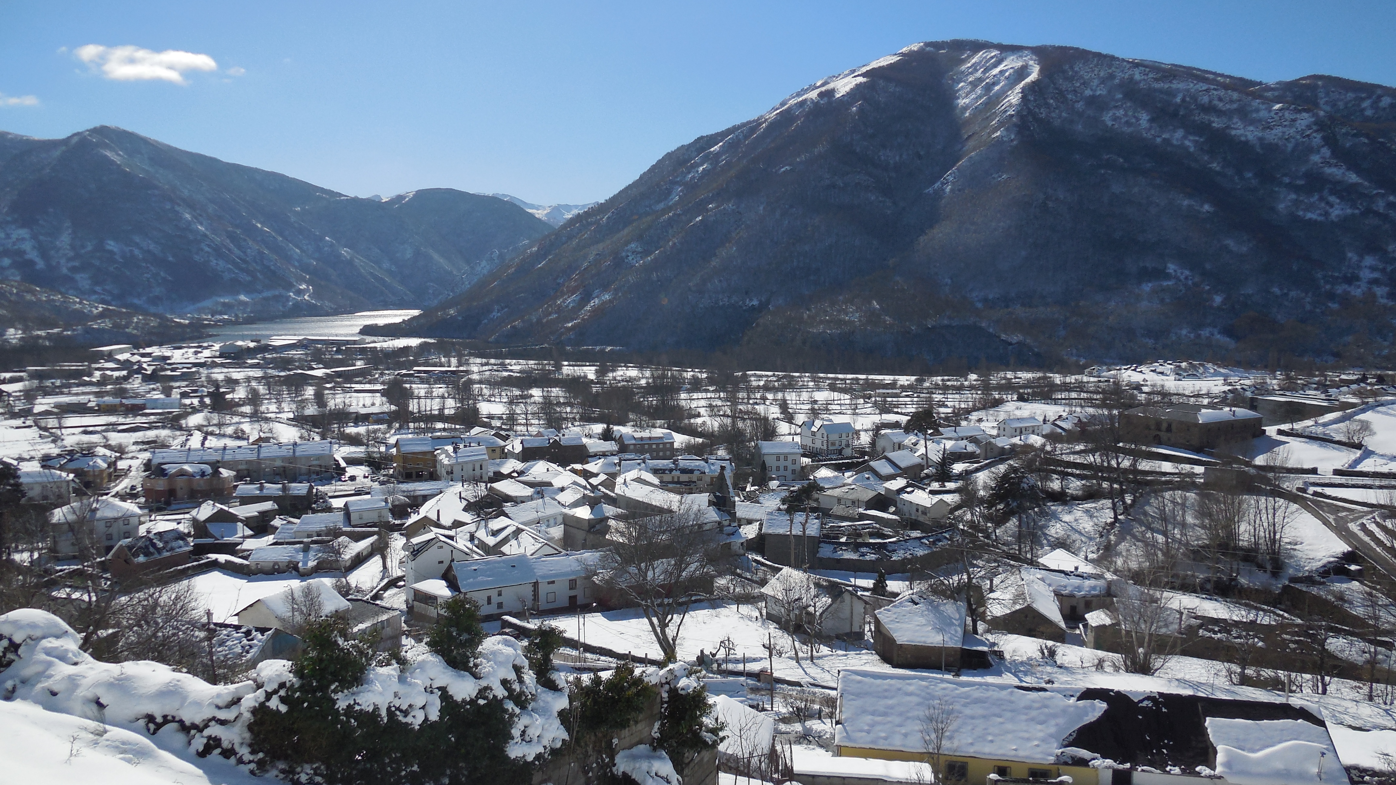 San Miguel de Laciana, Villablino (León, España).